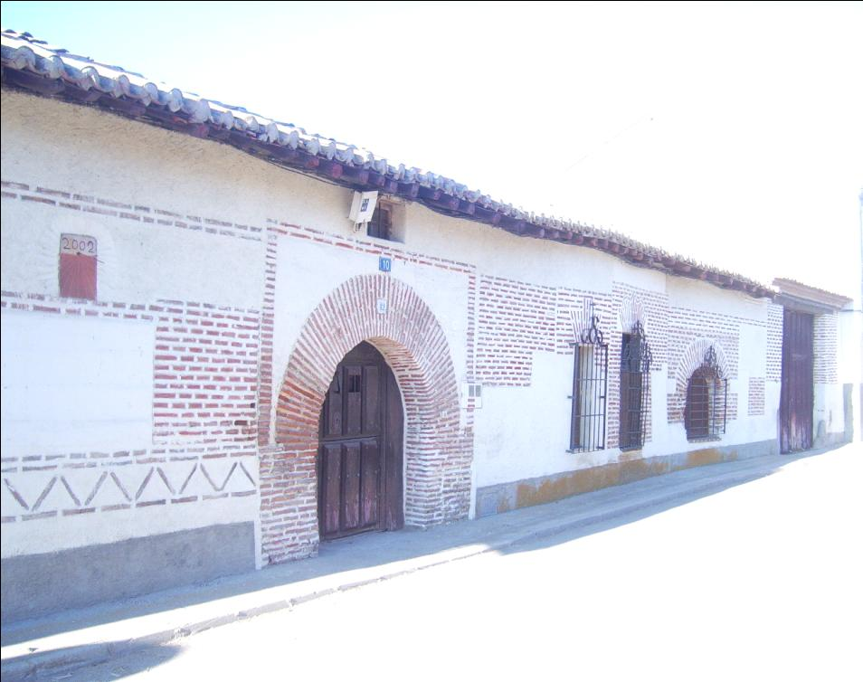 Casa en la Calle Sol número 10 en la localidad de Langa (Ávila)